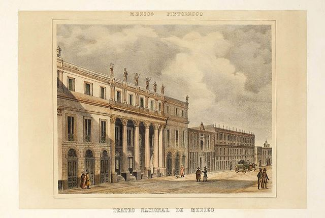 Grabado del siglo XIX con vista de la fachada del Gran Teatro Nacional de México